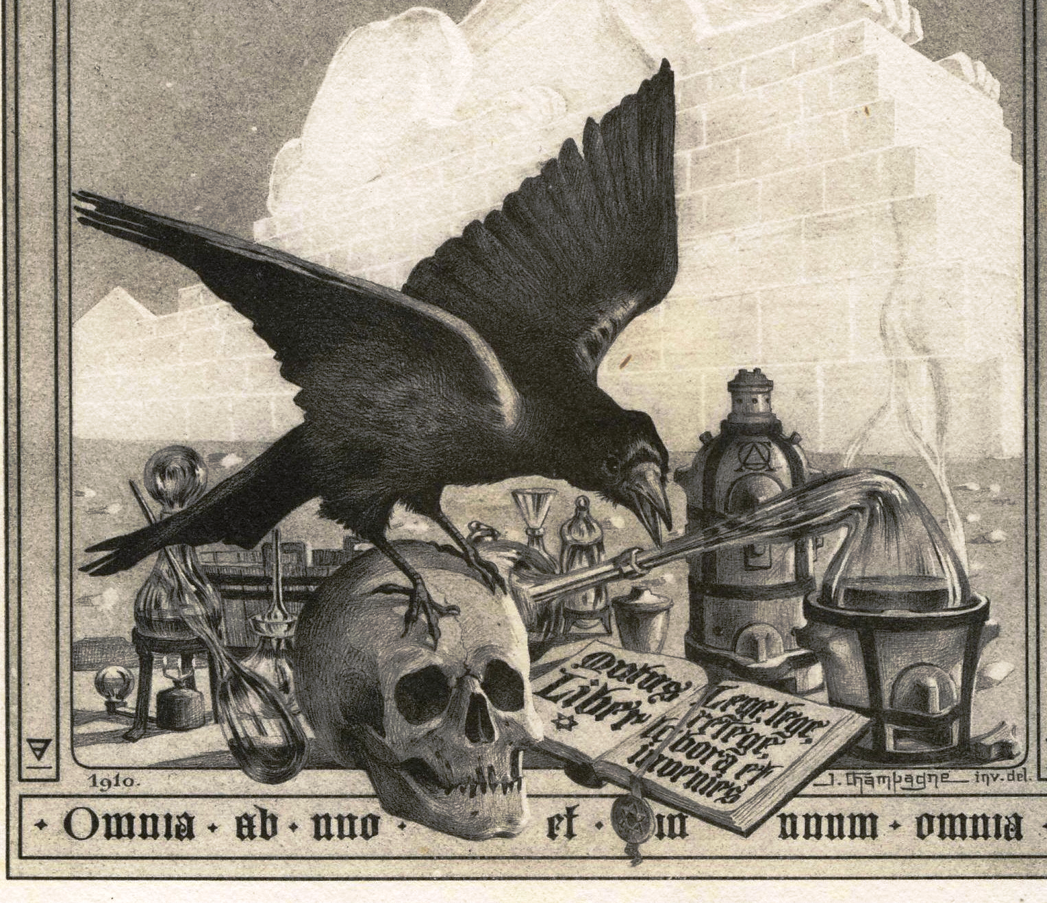 Dettaglio dal frontespizio di Mystère des cathédrales, illustrazione di Julien Champagne (1926)